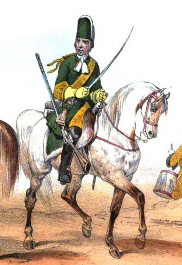 Según dice Clonard en la misma obra: "En este mismo año (1703) acabó de desaparecer todo el armamento y equipo de la casa de Austria. Los tercios de dragones se vistieron y armaron á la francesa, en esta forma: Casaca verde, chupa y calzon segun la divisa señalada á cada uno: un gorro de paño que consistia en cierto casquete en figura de media esfera de paño verde, y en su parte superior una borla blanca de seda floja; desde la frente subia una frontalera de carton ó pergamino fuerte, revestida de paño del color de la divisa, y guarnecida de un galon de seda blanca: el pelo recogido en una bolsa de cuero; en lugar de botas botin de cuero flexible con trabillas, bandolera de ante amarillo, cruzada del hombro izquierdo al costado derecho, de dos tercios de palmo de ancha con su correspondiente gancho para asegurar el fusil; corbata blanca, y en el hombro derecho una dragona de cordon de estambre amarillo con cabetes de metal. Componíase la montura de silla con borrenes, cubierta de una piel de carnero que era negra, en todas las compañias, escepto la de granaderos, que la usaba blanca, sirviendo esta piel para cubrir las pistoleras y dormir en los campos; mantilla y tapafundas del color de la divisa con galon de paño, del color de la casaca y maleta. El armamento constaba del fusil que se acomodaba al lado derecho, la boca arriba, y apoyado por la culata en una zapatilla de cuero, asegurándole una correa por la segunda abrazadera al borren trasero; bayoneta de dos cortes, parecida al cuchillode monte con mango de madera, y vaina adherida al cinturon, en el que se hallaba asimismo el cartucho ó cacerina, un poco inclinado hácia la cadera derecha; frasco de asta para cebar, pendiente de un cordon; sable corvo, con la vaina guarnecida y una pistola en la funda izquierda."